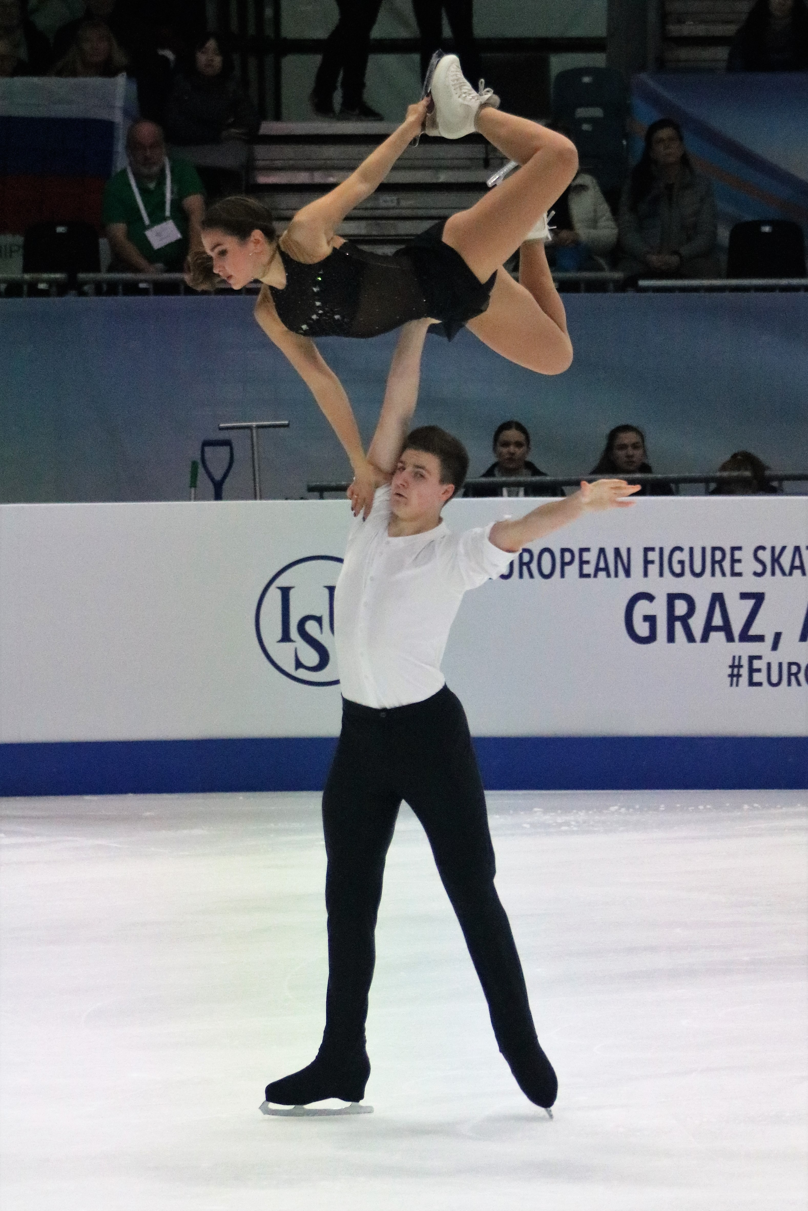 София Нестерова и Артём Даренский (Украина) на чемпионате Европы по фигурному катанию 2020